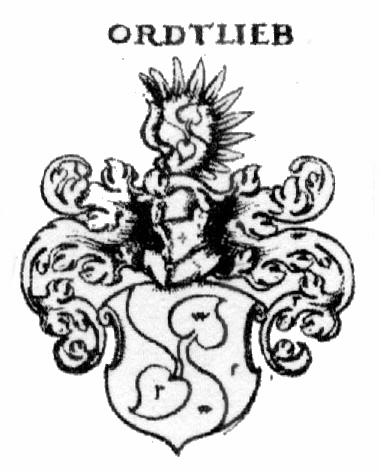 Wappen der Nürnberger Patrizierfamilie Ortlieb